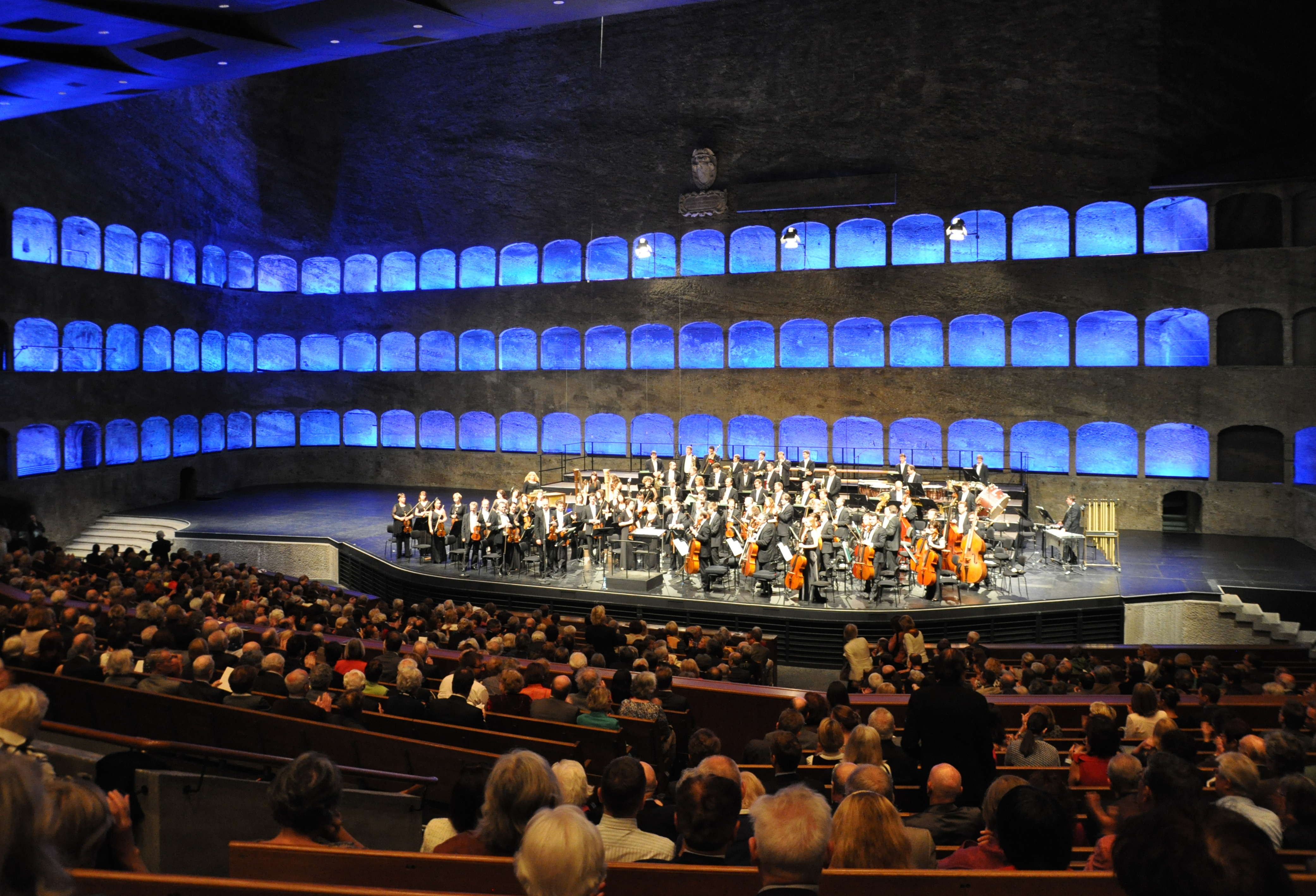 Salzburg, Felsenreitschule